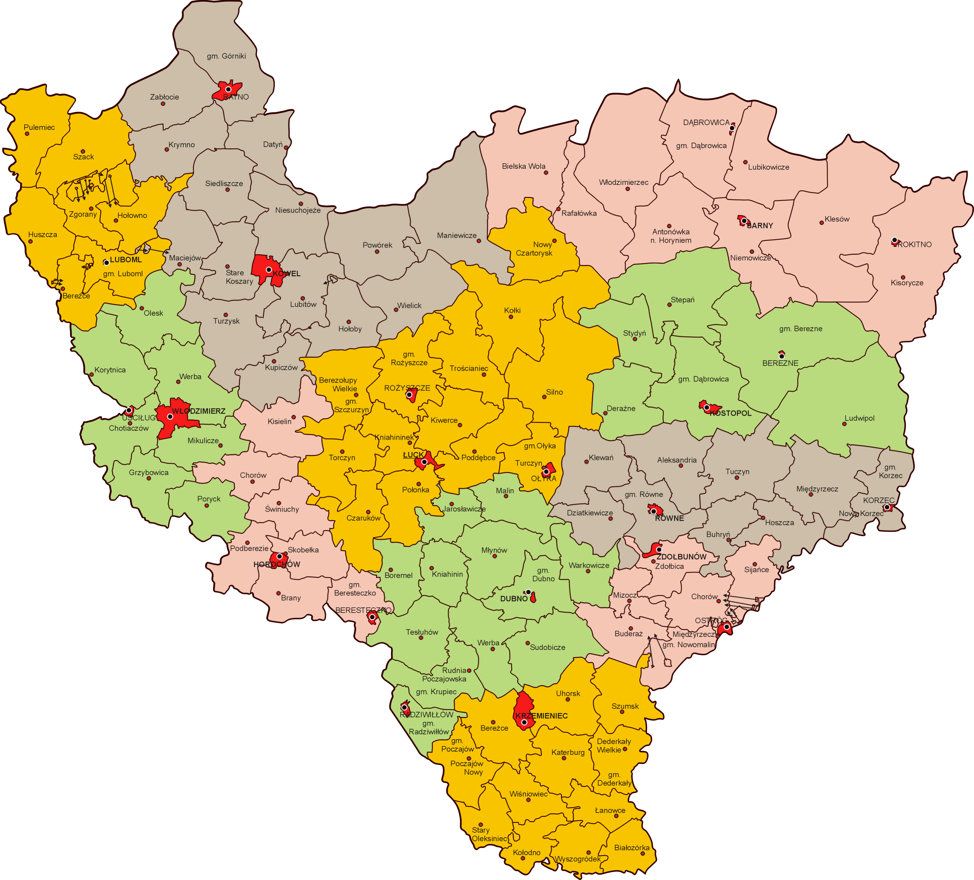 Podział administracyjny województwa wołyńskiego w 1939 r.